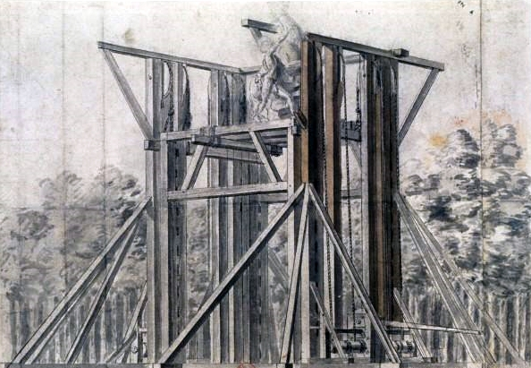 Échafaud pour monter les Chevaux de Marly aux Champs-Élysées en 1794. Dessin à la plume et lavis à l'encre de Chine, rehauts d'aquarelle, par Nicolas Coustou (1658-1733), frère de Guillaume Coustou (1677-1846), le sculpteur des Chevaux de Marly.